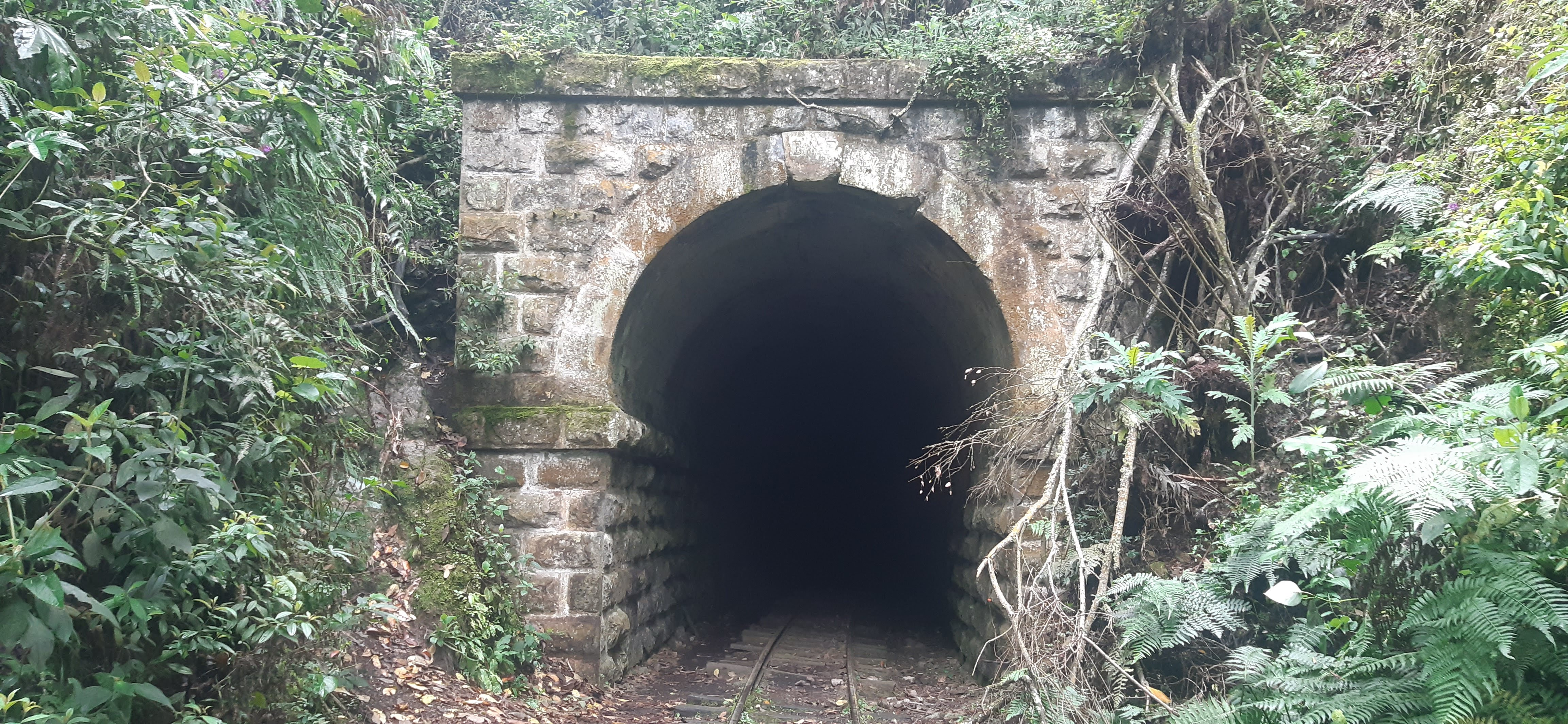 Túnel en el municipio de Zipacon